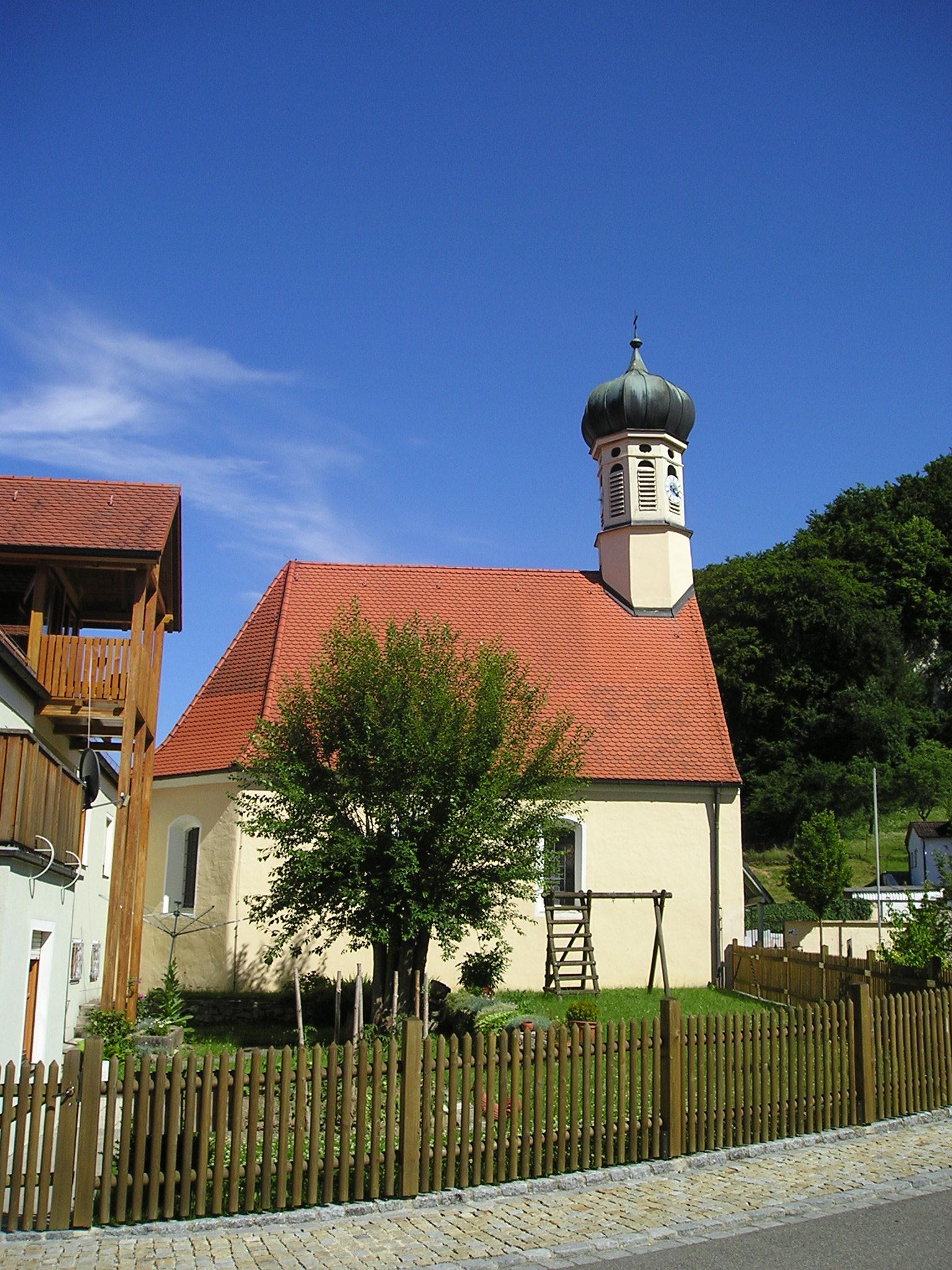 Evangelische Barock-Apostelkirche in Wellheim-Konstein